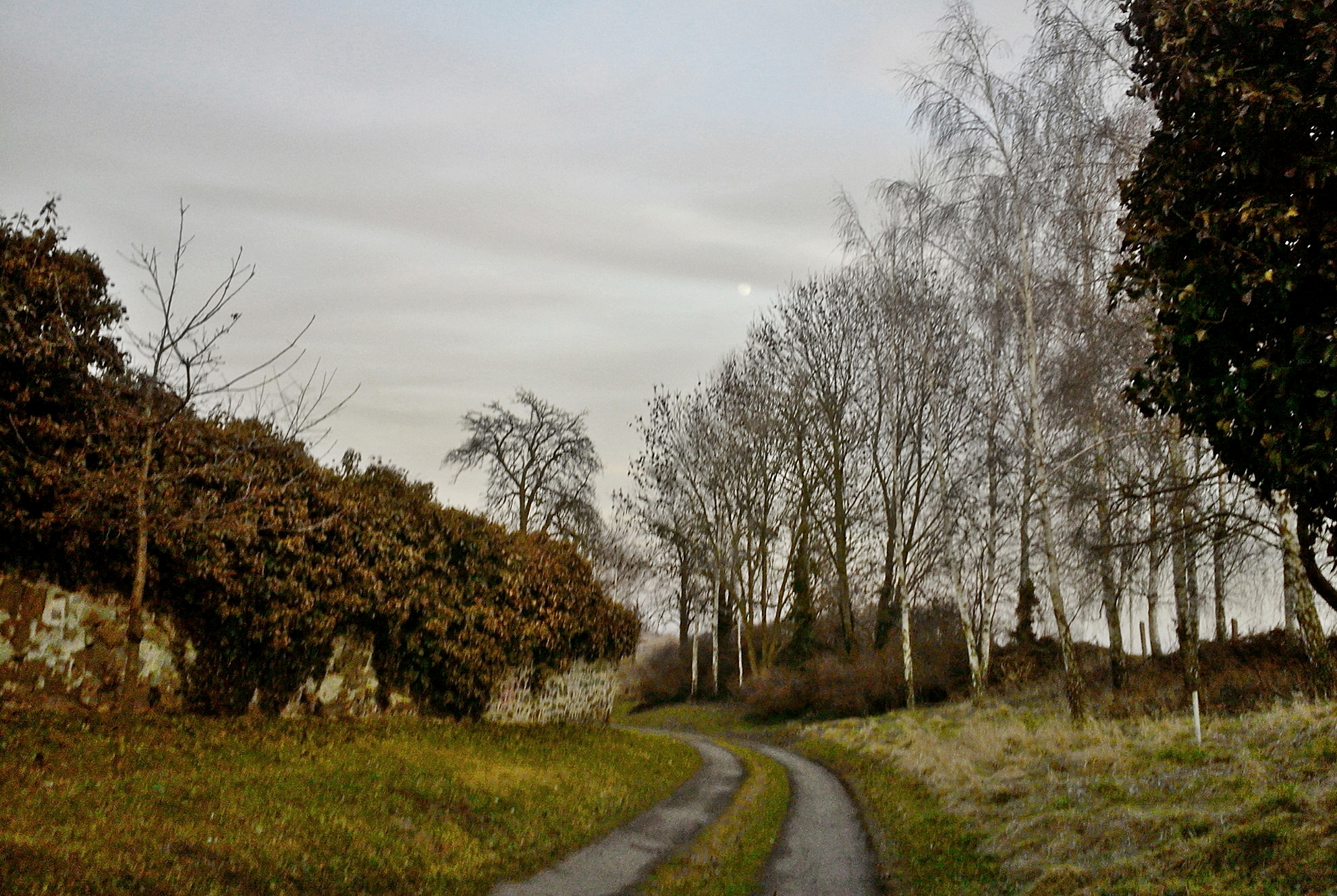 Dorfmauer in Gutenswegen am Gänseberg